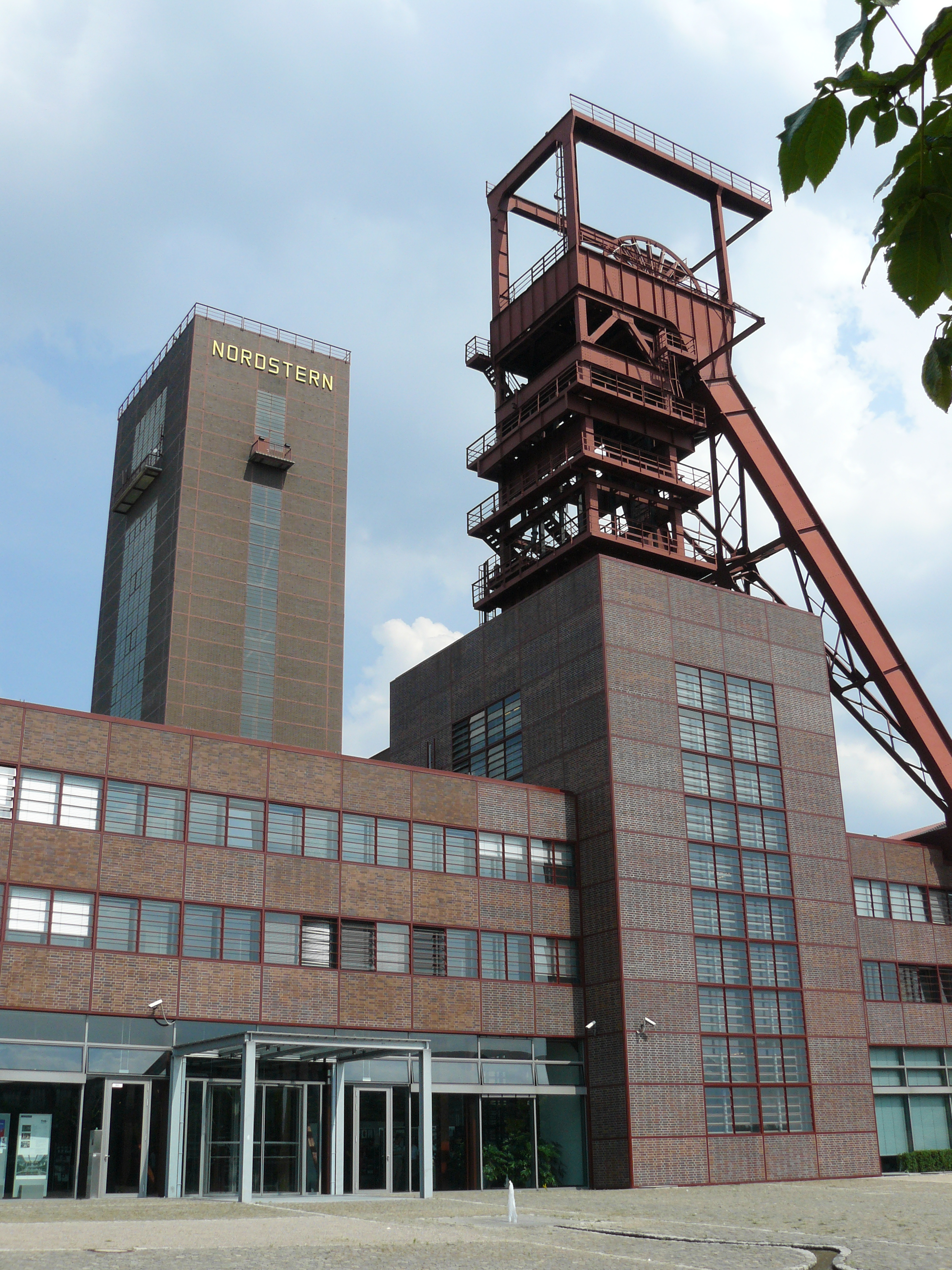 Северный Рейн-Вестфалия, Гельзенкирхен - шахта "Нордштерн"